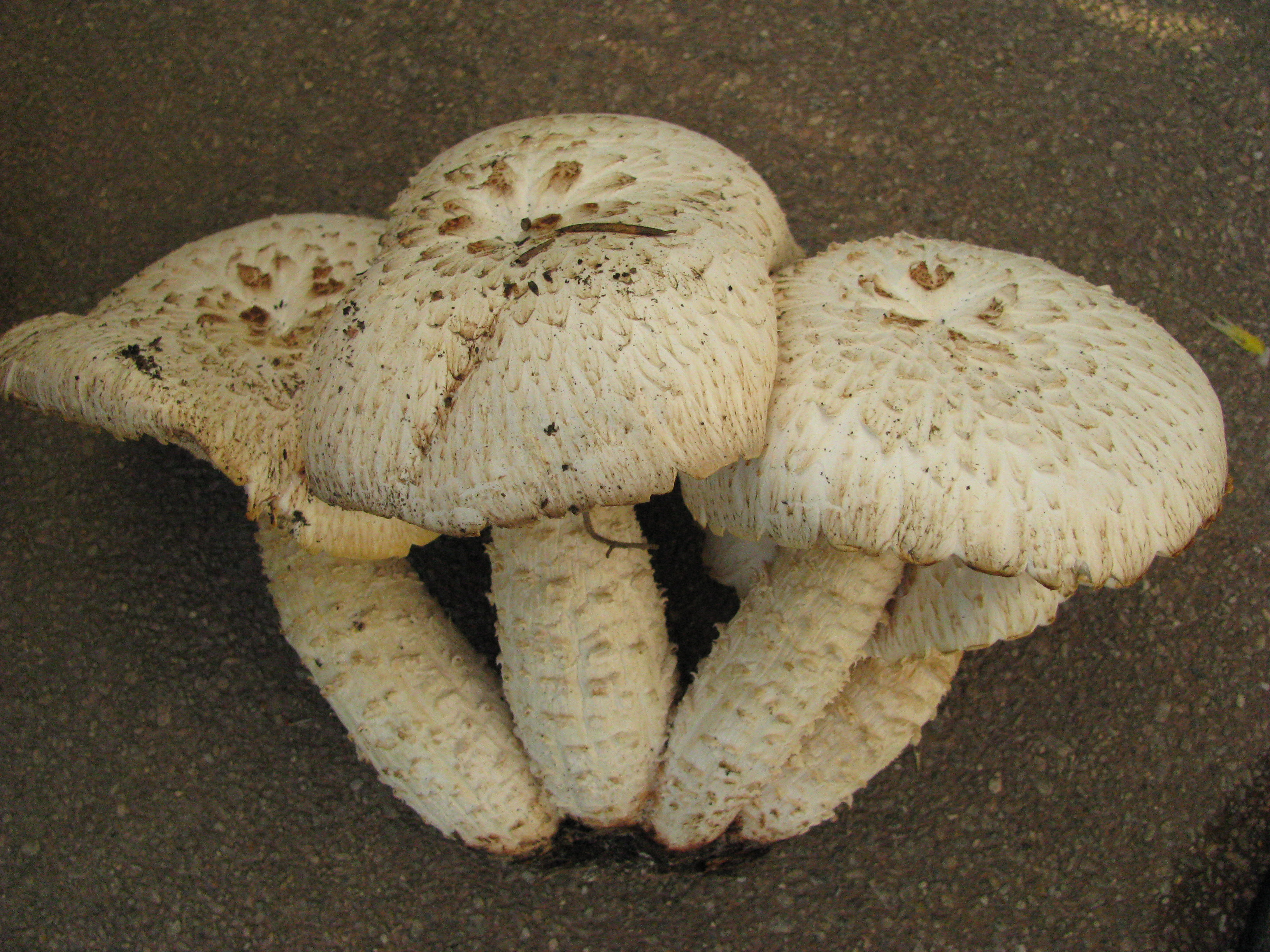 Schuppiger Sägeblättling Neolentinus lepidues